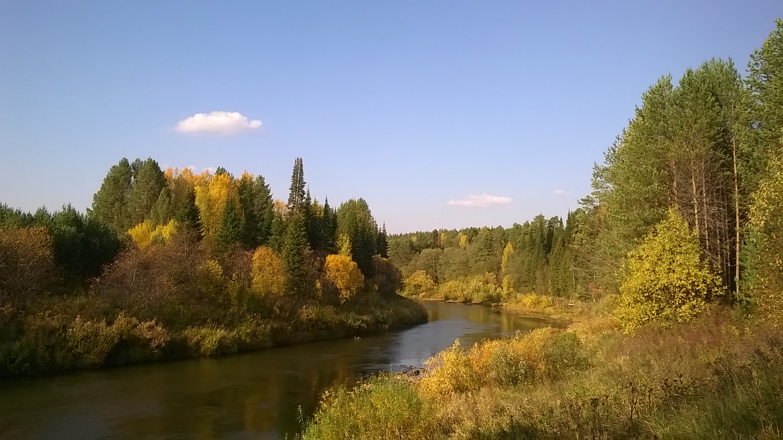 Природный комплекс в районе села Великорецкое, Юрьянский район This image is related to the protected area of Russia number 4310278